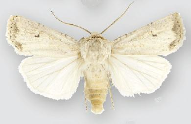 Euxoa misturata male